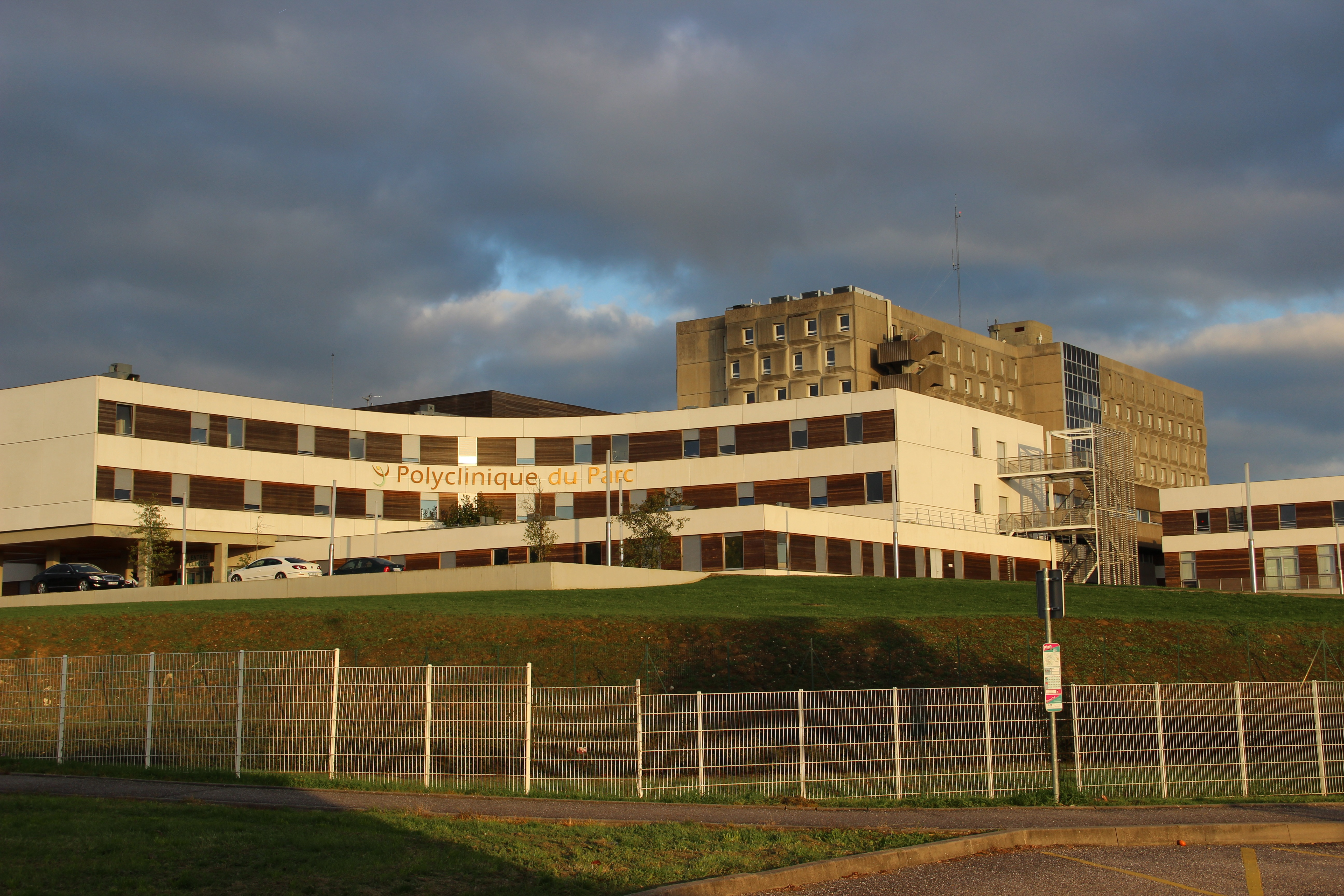 La clinique du Parc au premier plan et le Centre Hospitalier au fond.